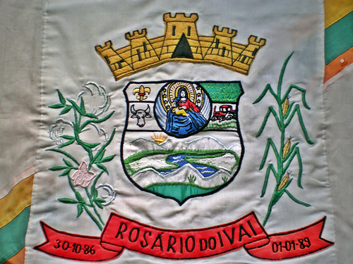 Bandeira de Rosário do Ivaí